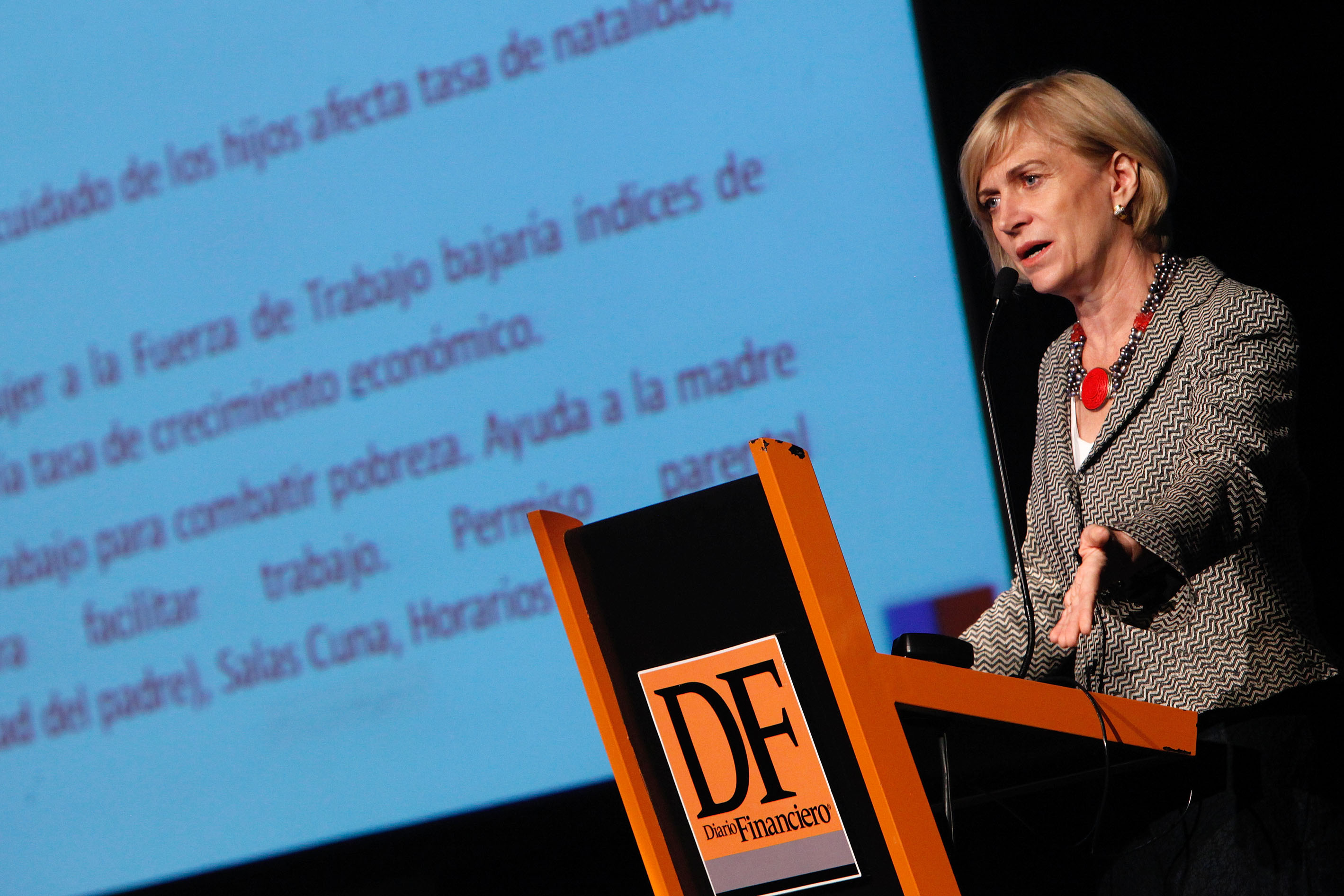 La ministra del Trabajo y Previsión Social, Evelyn Matthei, afirmó que la decisión del gobierno de proponer la extensión del posnatal a 6 meses “no es sólo un tema de apego ni de lactancia materna, ni tampoco se tomó por razones políticas. Es un tema que tiene que ver con crecimiento económico, de incorporar a más mujeres al mercado del trabajo, y hay que tomárselo en serio”.